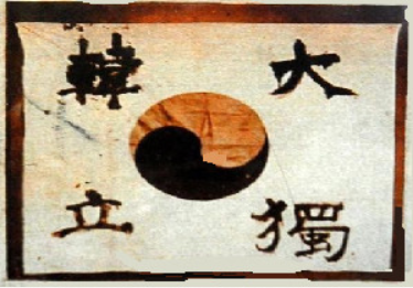 이 태극기는 대한 독립을 위해 싸우다가 1910년 3월 26일 순국하신 안중근 의사가 혈서로 제작한 것입니다.